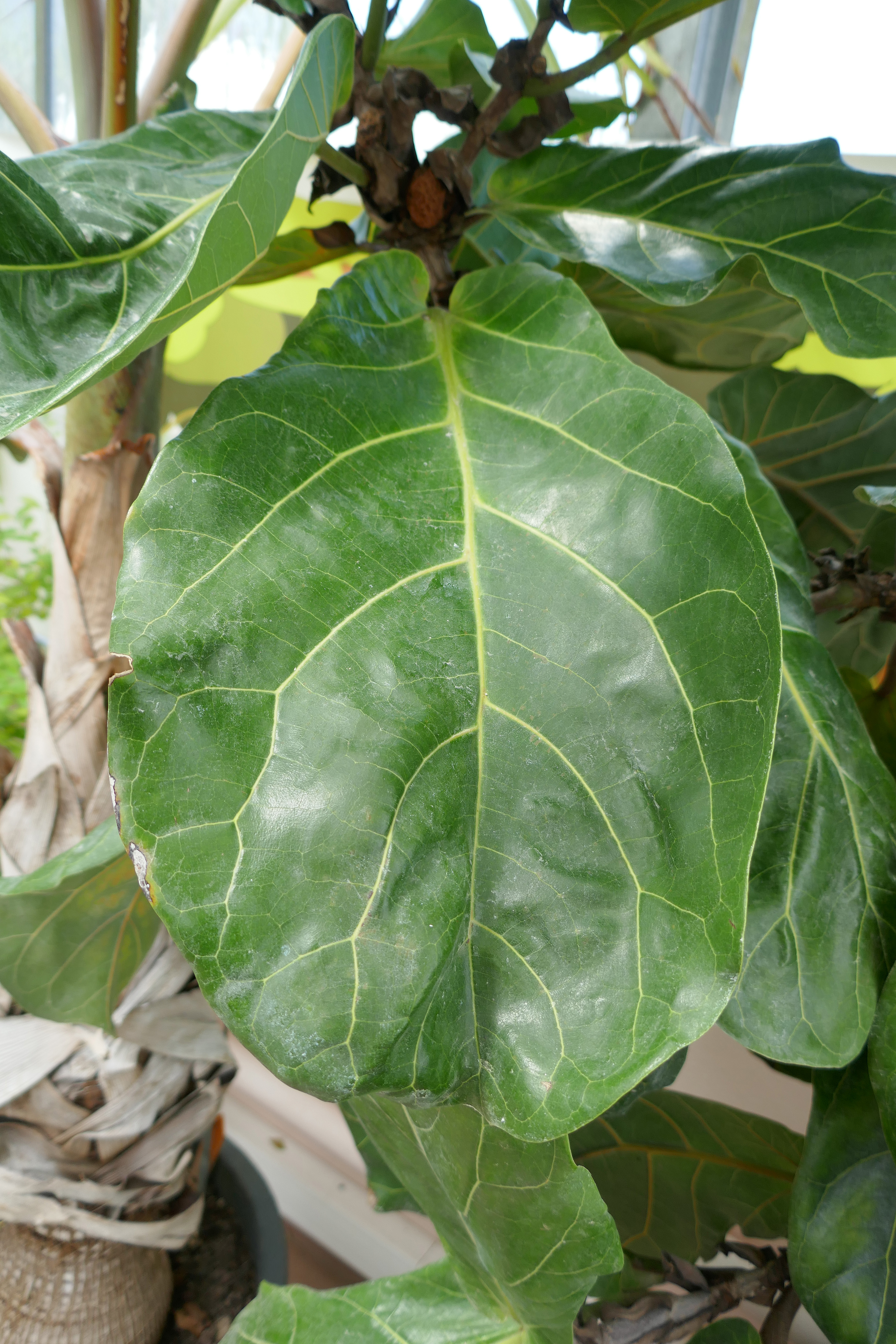 W. Afr. trop. Ficus lyrata Warb. (= F. pandurata Sander) Jardin botanique Jean-Marie Pelt, Villers-lès-Nancy.